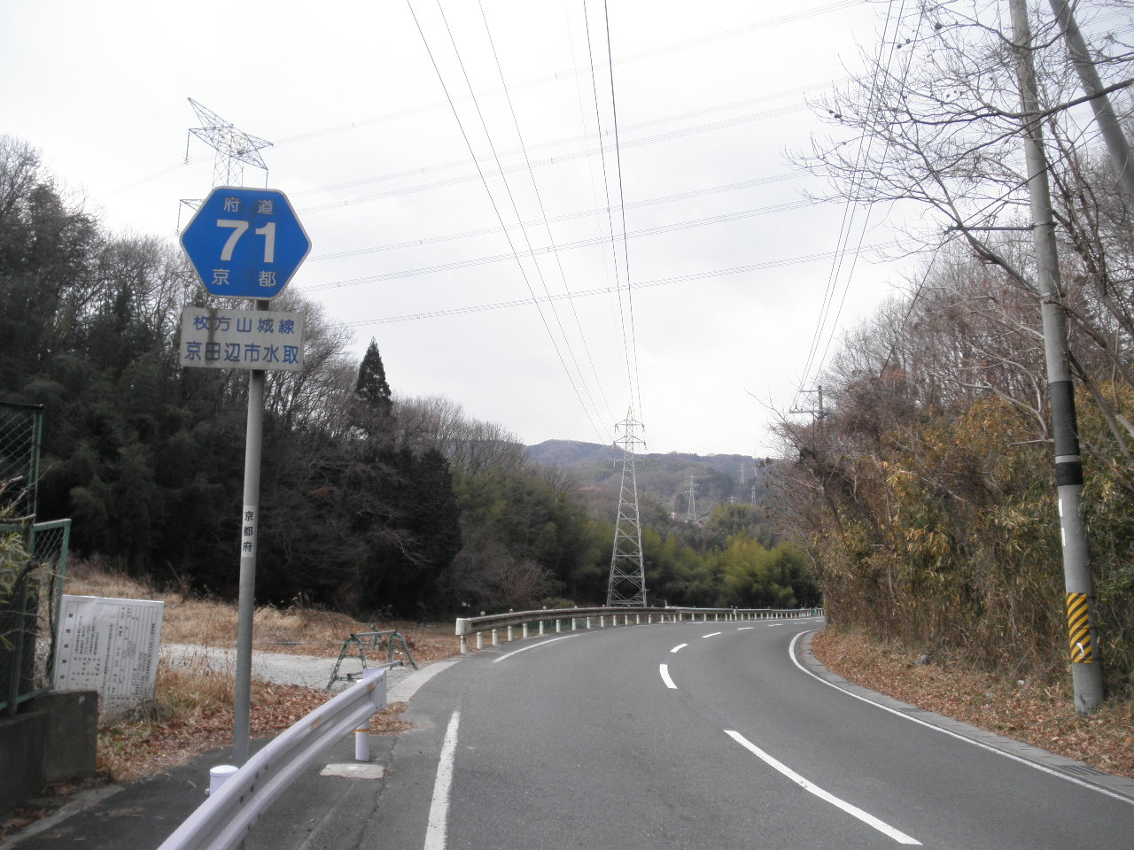 京都府京田辺市水取梅ノ木峠 大阪府道・京都府道71号枚方山城線 標識